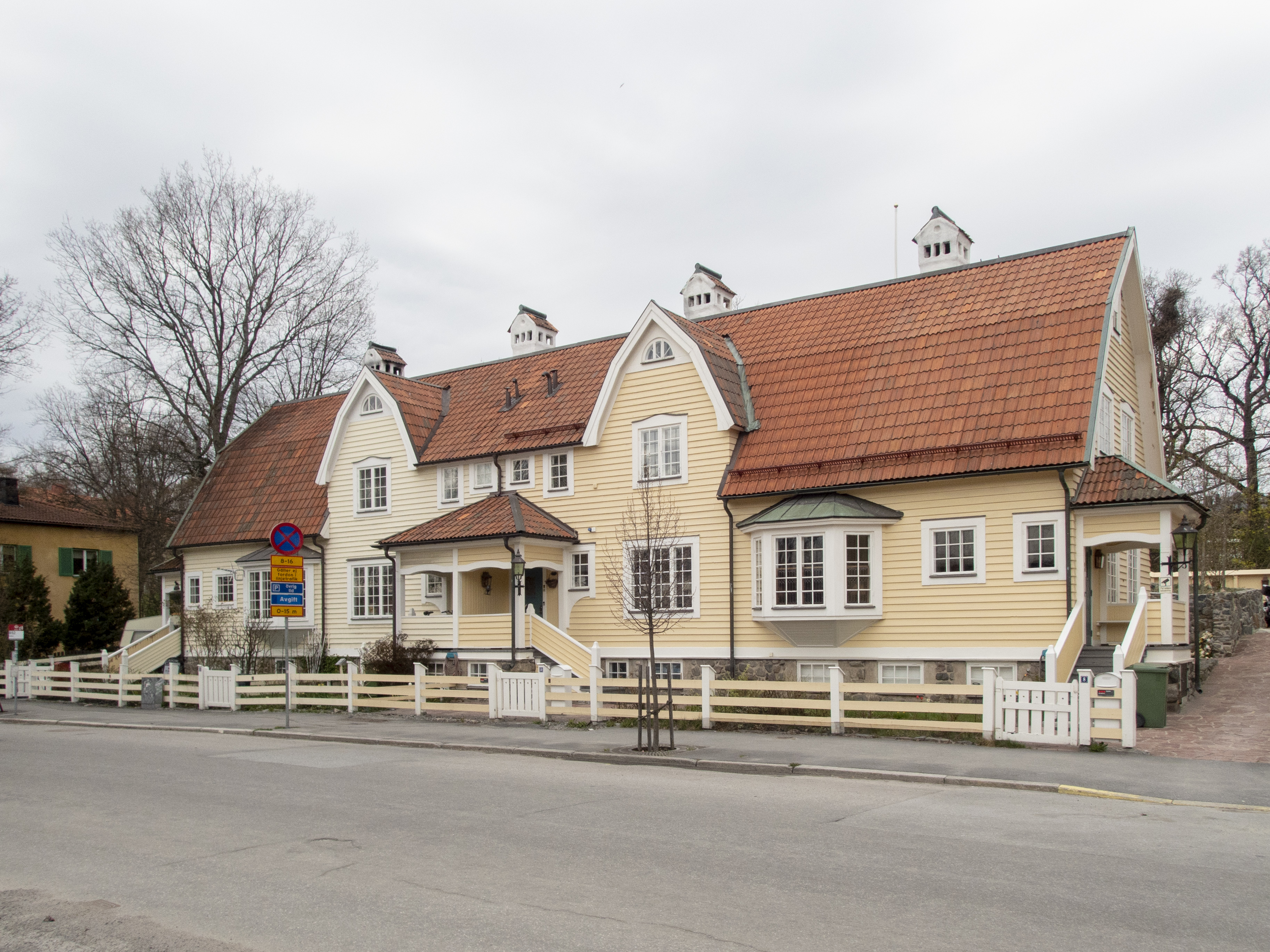 Fyrväpplingen 5, Stråkvägen 10 Solna, Nybyggnadsår 1908 - 1909 Upphovsman G H Sandberg (Arkitekt)